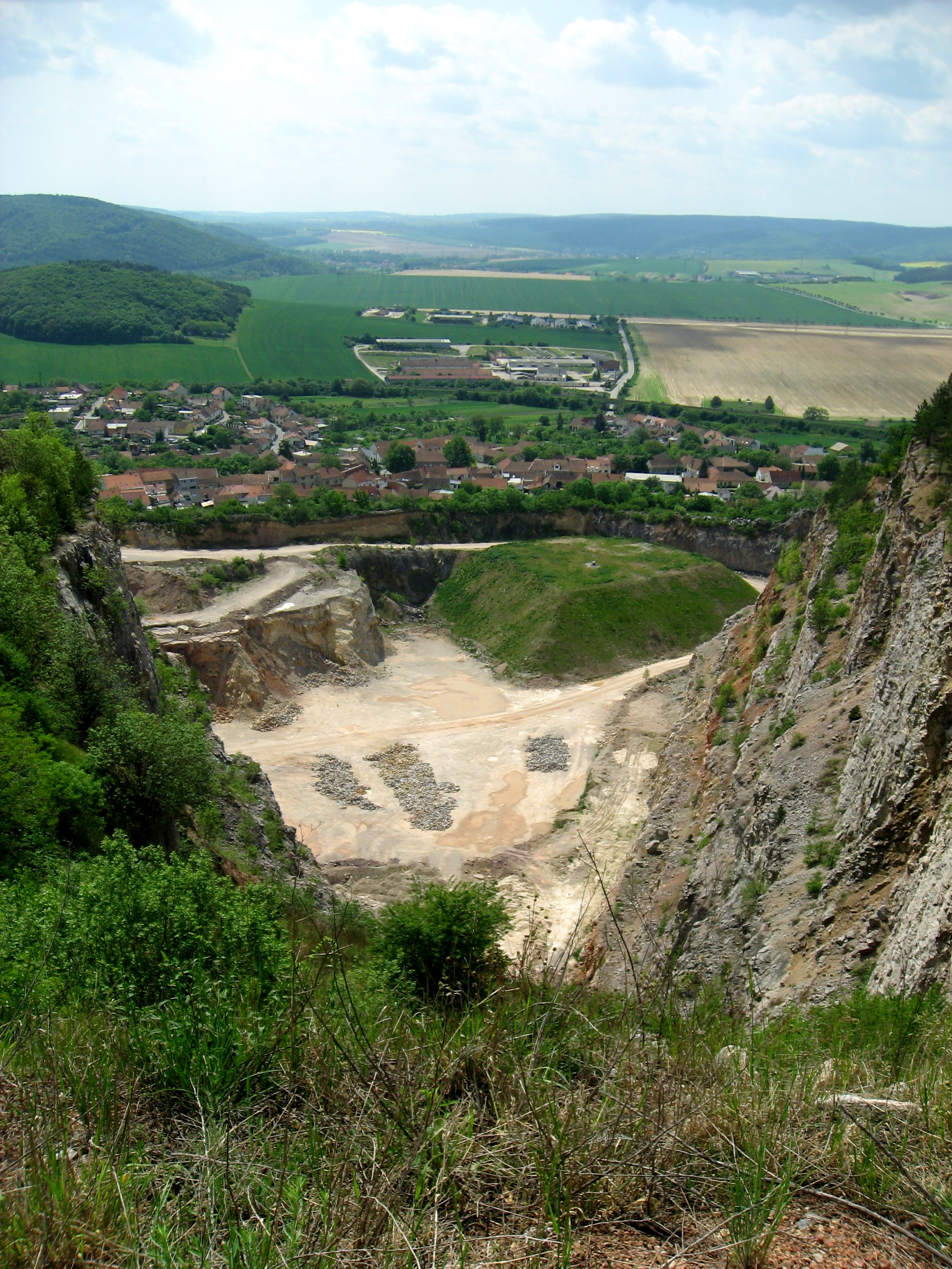 Čebín, lom